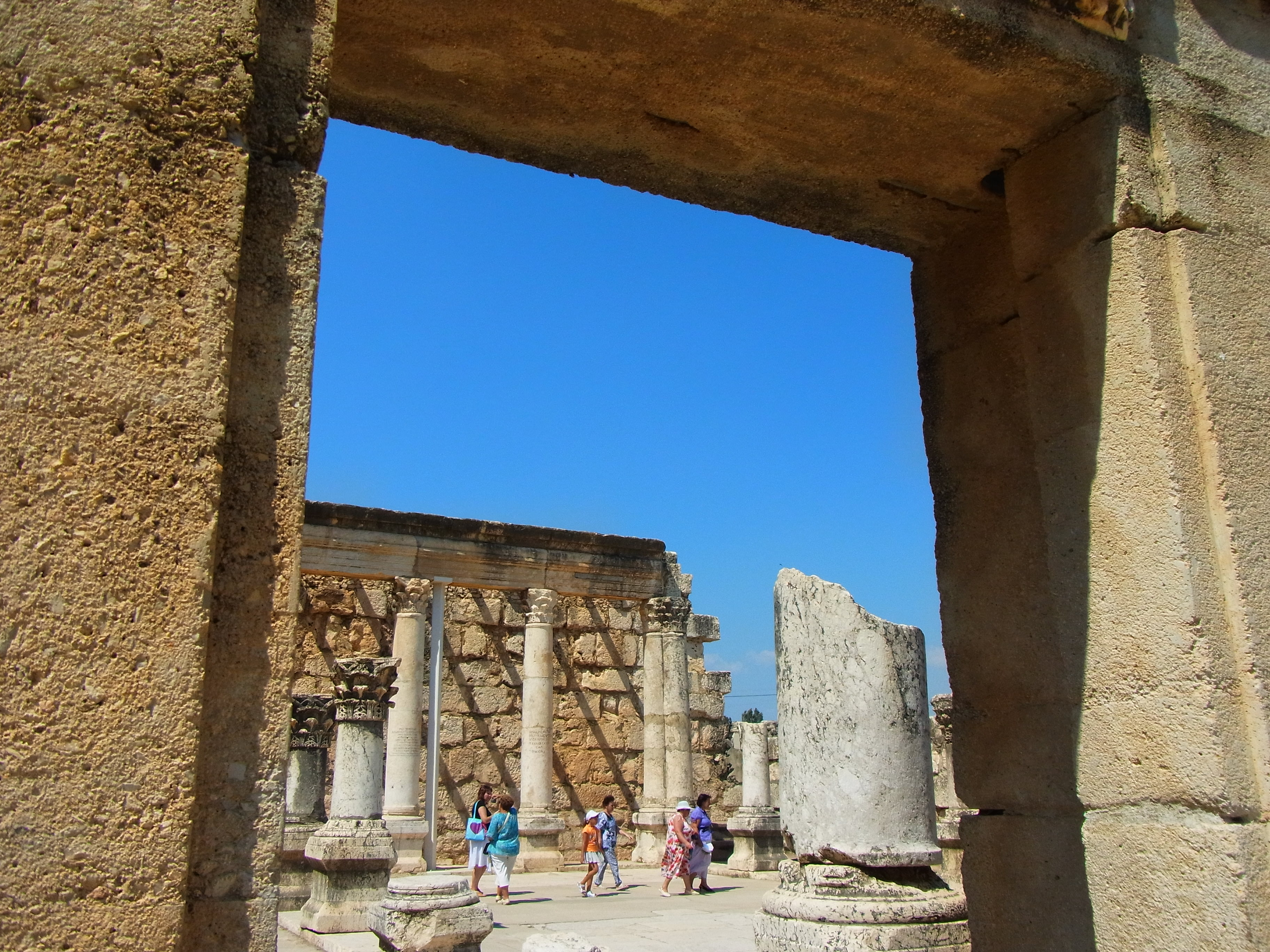 中文（香港）: 迦百農的遺跡